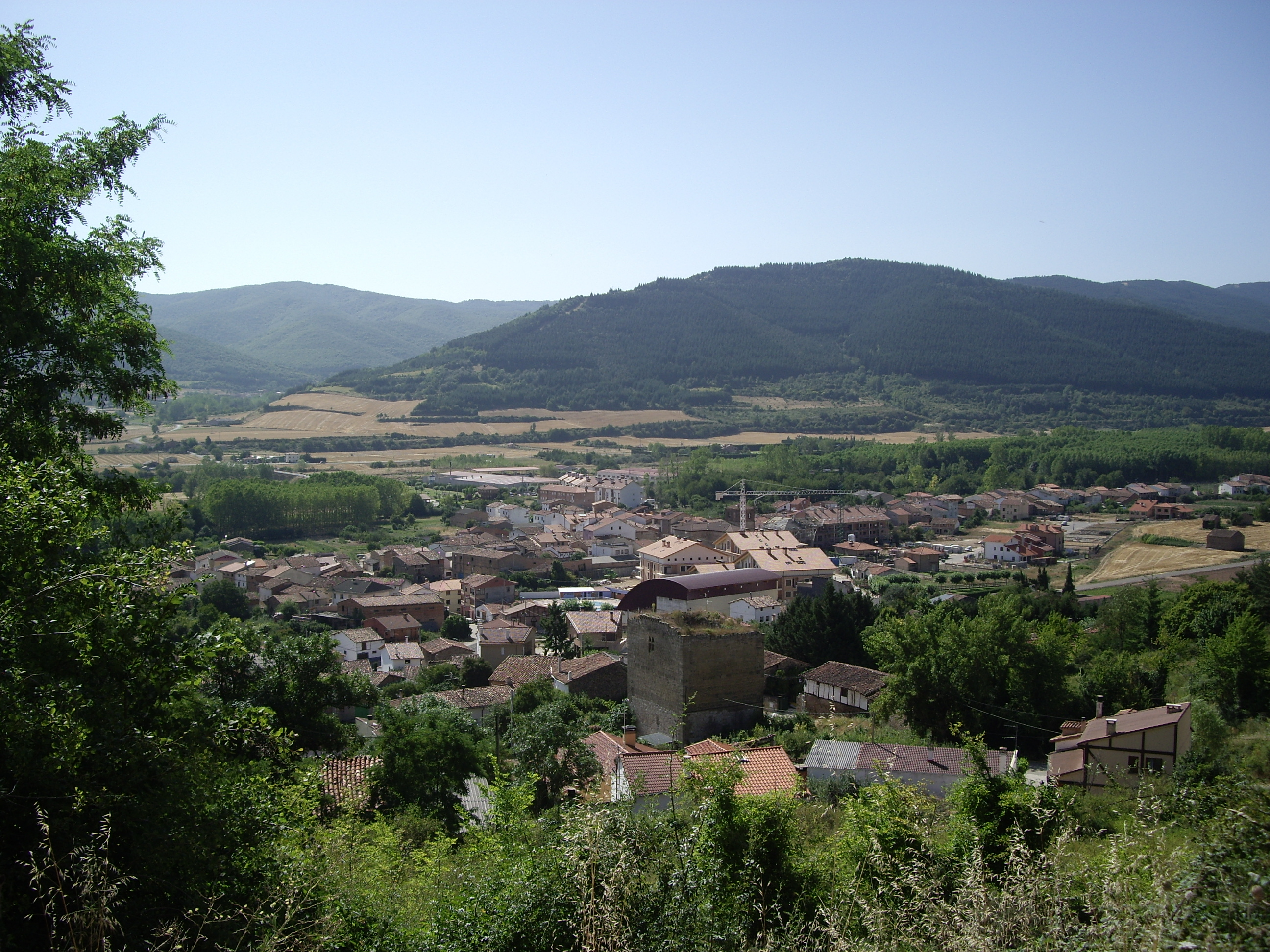 Vista de Santurde de Rioja (La Rioja - España)